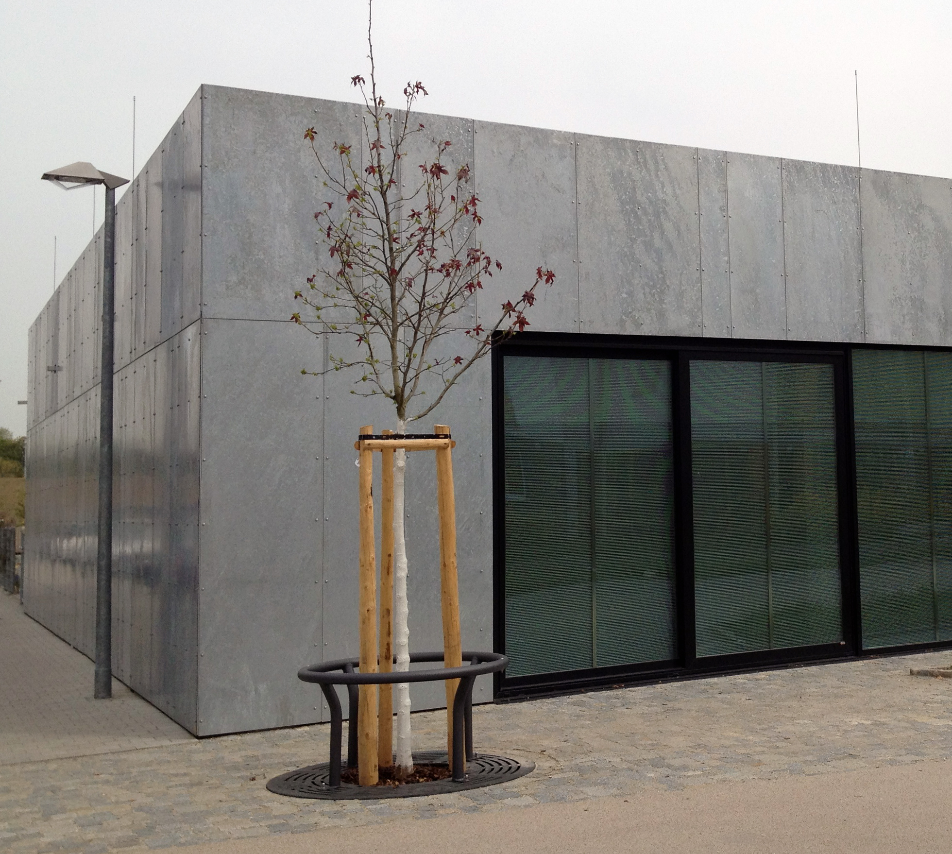 Fassade, stückverzinkt gemäß DIN EN ISO 1461